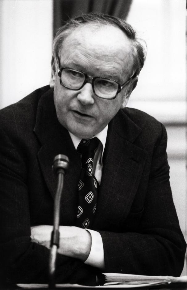 Minister R.J.H. Kruisinga (CHU) van Defensie aan het woord in de Tweede Kamer. Den Haag, Nederland, 16 februari 1978.